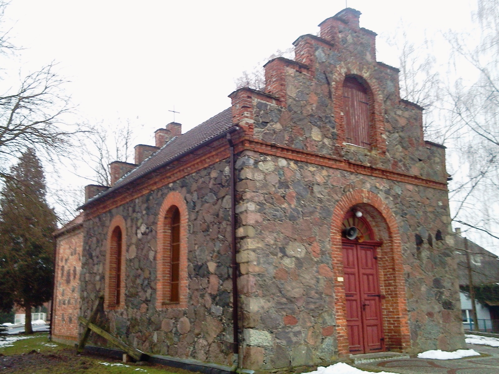 Radowo Małe - rzymskokatolicki kościół parafialny p.w. MB Szkaplerznej